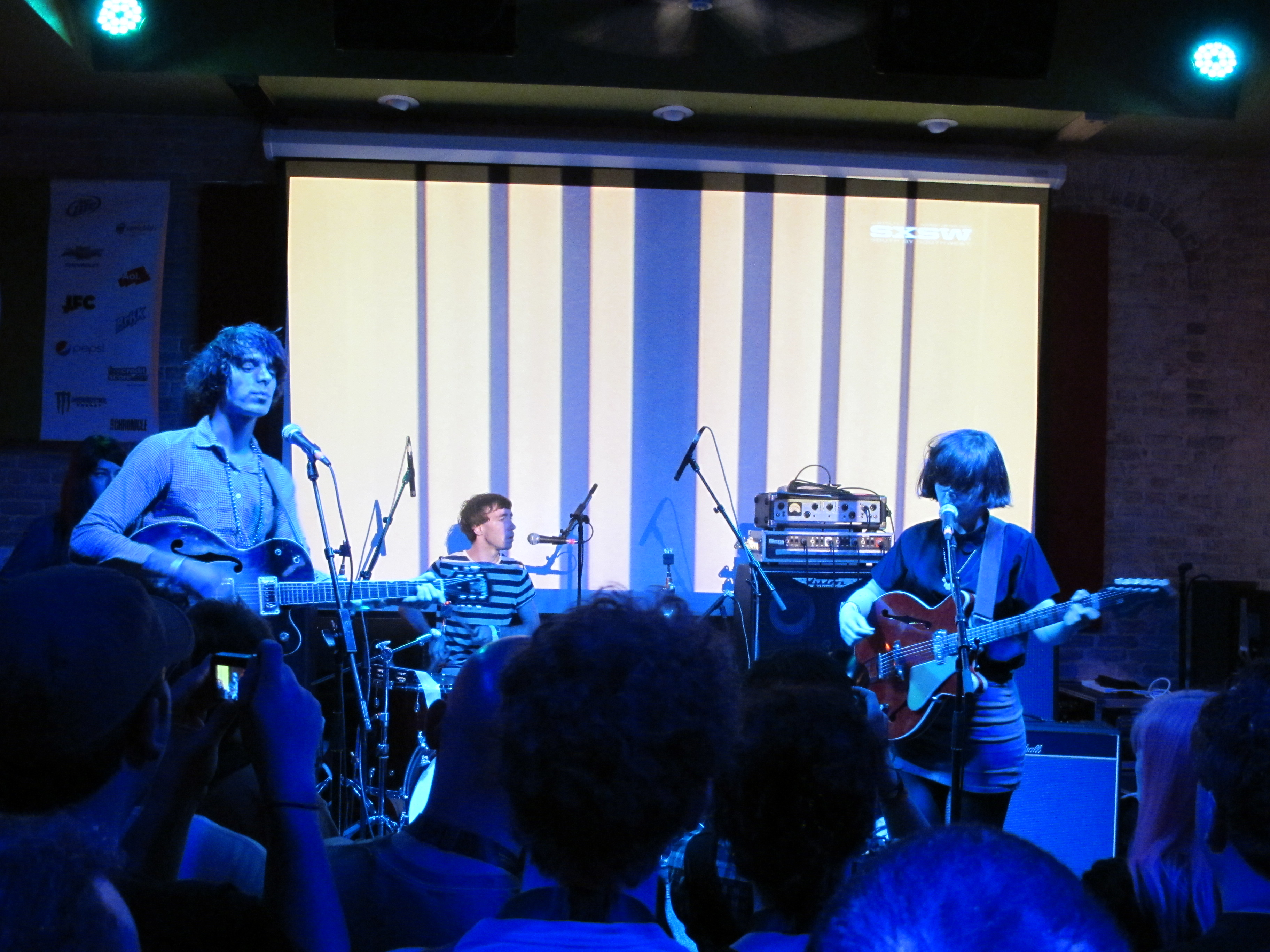 Veronica Falls at SXSW